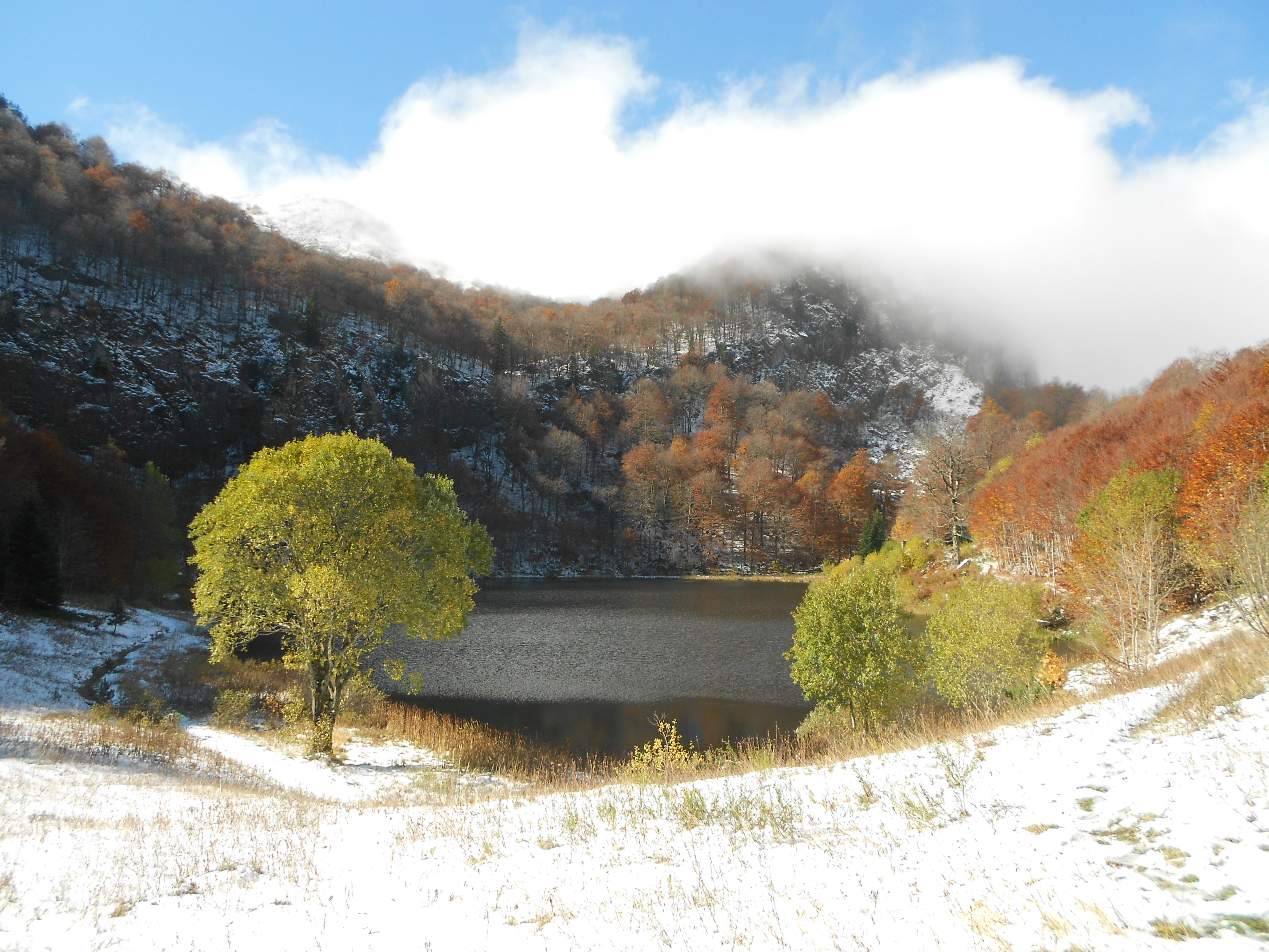 Национални парк „Сутјеска", Фоча, Гацко, Калиновик ID добра: NP001